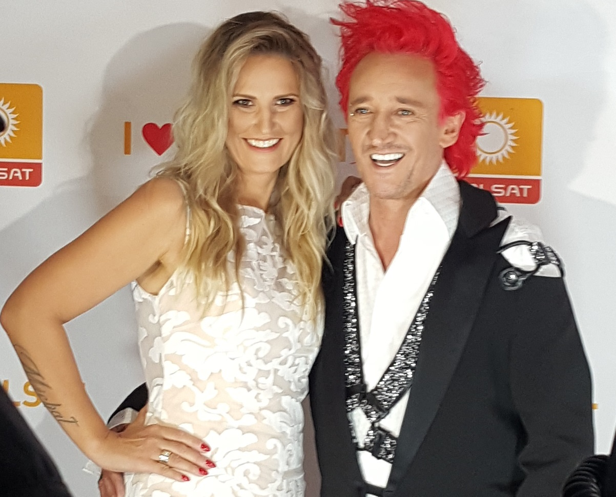 Polski wokalista Michał Wiśniewski i jego żona Dominika Tajner-Wiśniewska na jesiennej konferencji ramówkowej telewizji Polsat w Warszawie, 28 sierrnia 2018.